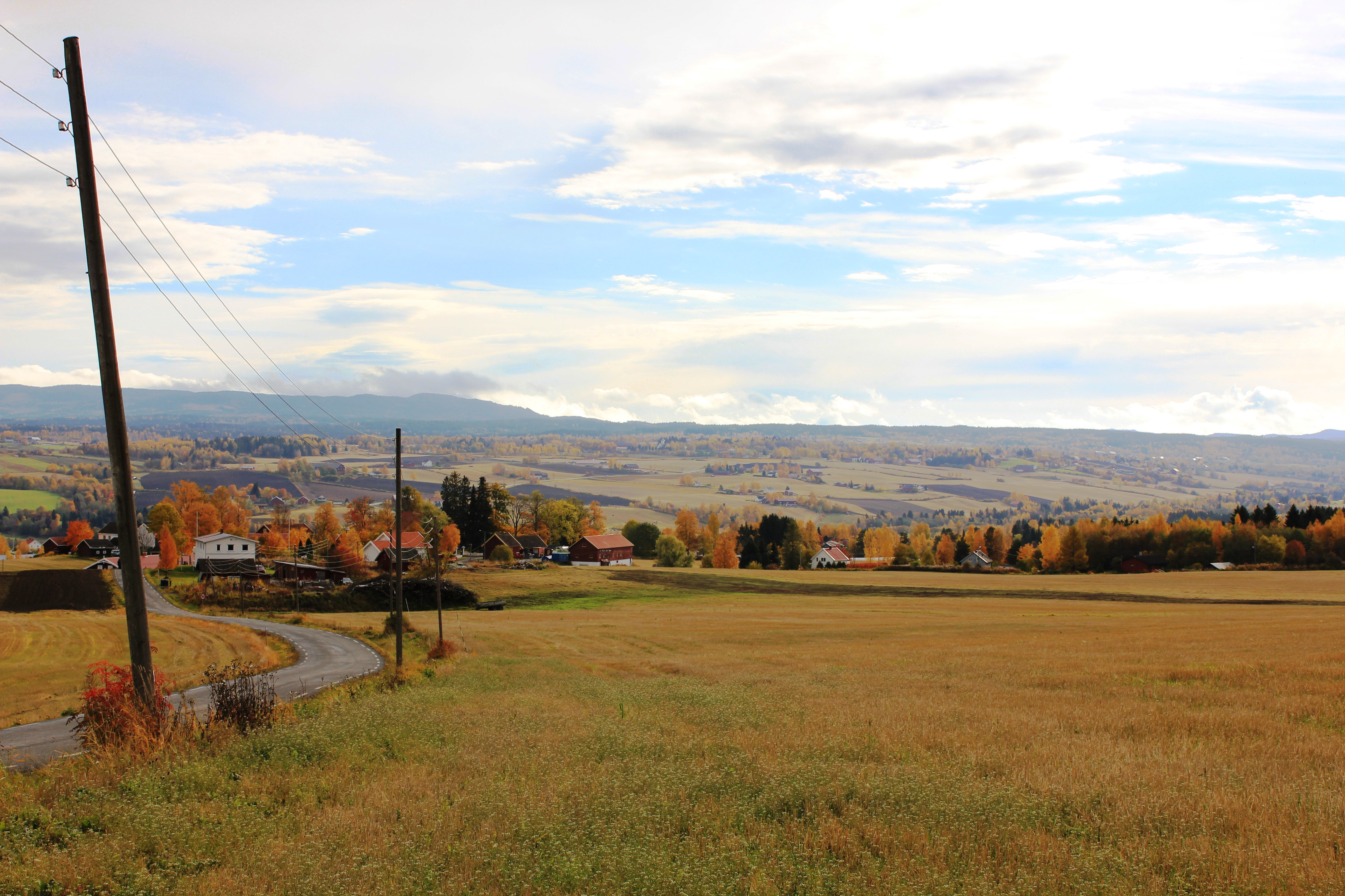 Jordbruksbygda Kolbu på Toten.